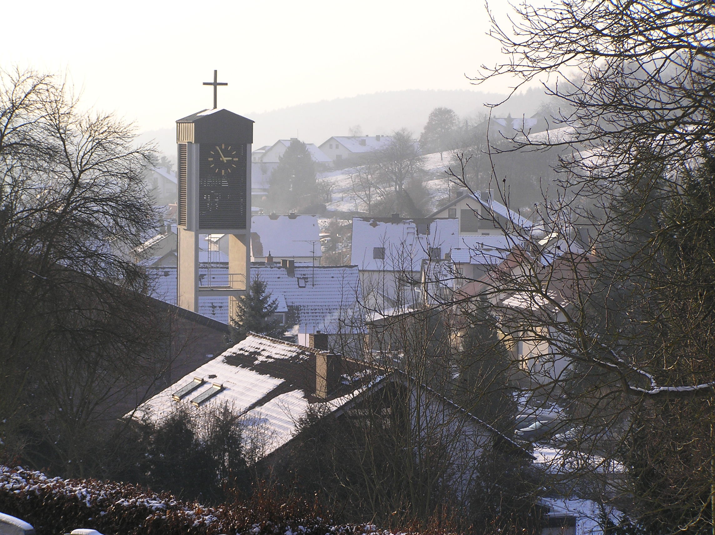 Die katholische Kirche im Sulzbacher Ortsteil Soden im Winter